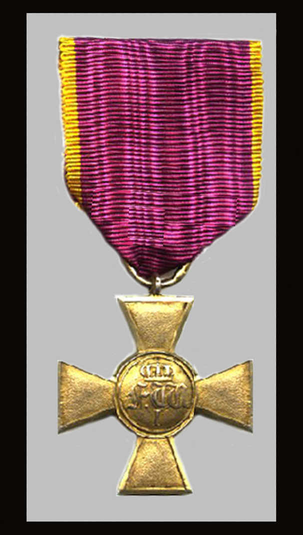 Offiziersdienstauszeichnung für 25 Dienstjahre in der Kurhessichen Armee. Verliehen von 1849 bis 1866